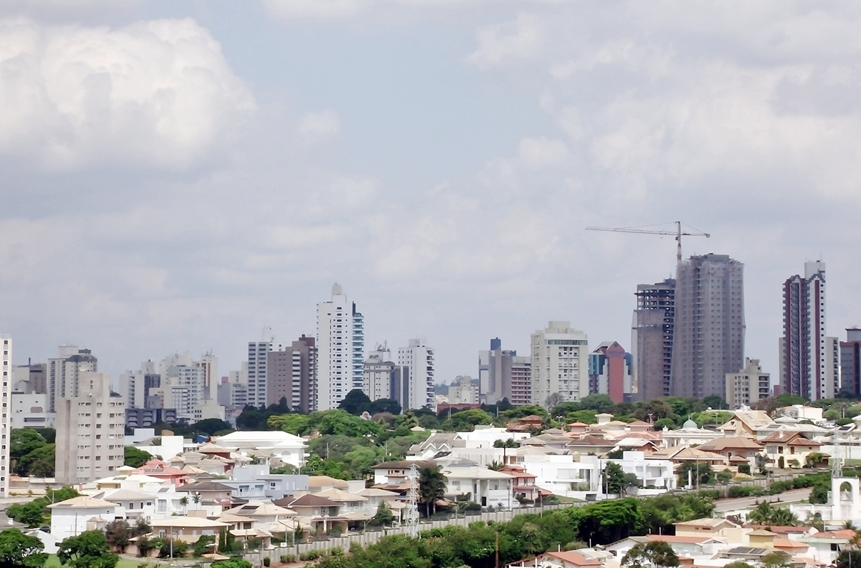 Vista da região oeste de Jundiaí. Mais ao fundo, o início da região central.